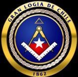 logo gran logia